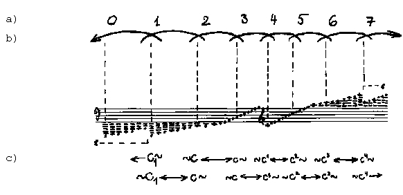 Seitsmest elemendist koosnev registripiirkondade rida: a) registripiirkondade rea elemendi number, b) registripiirkonna ambituse suhtelise suuruse esitamine graafiliselt, c) registripiirkonna ambituse suhtelise suuruse esitamine tähemärkidena